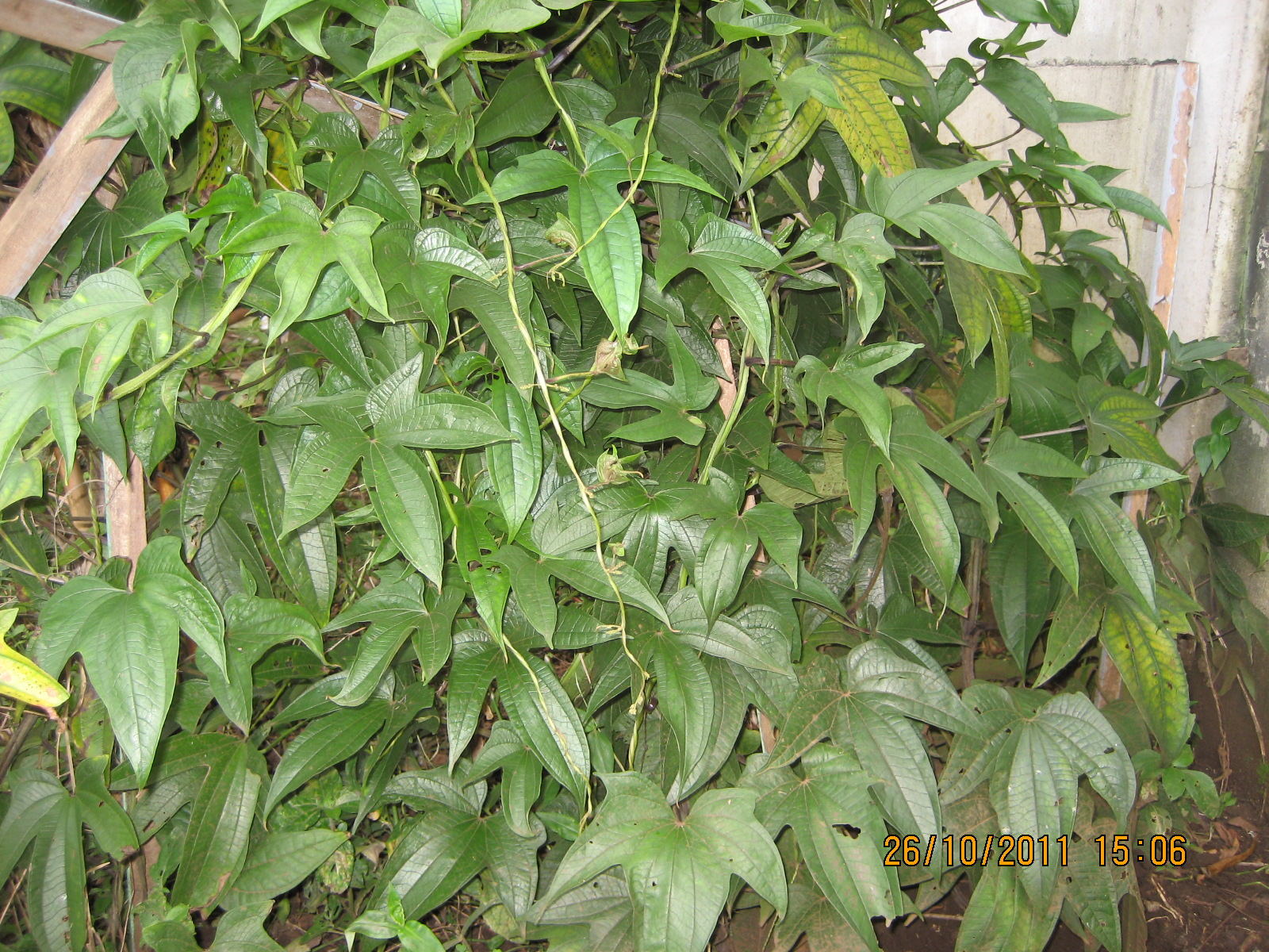 La foto corresponde a plantas de esta especie sembradas en mi propiedad para la investigación y cultivo de la misma.